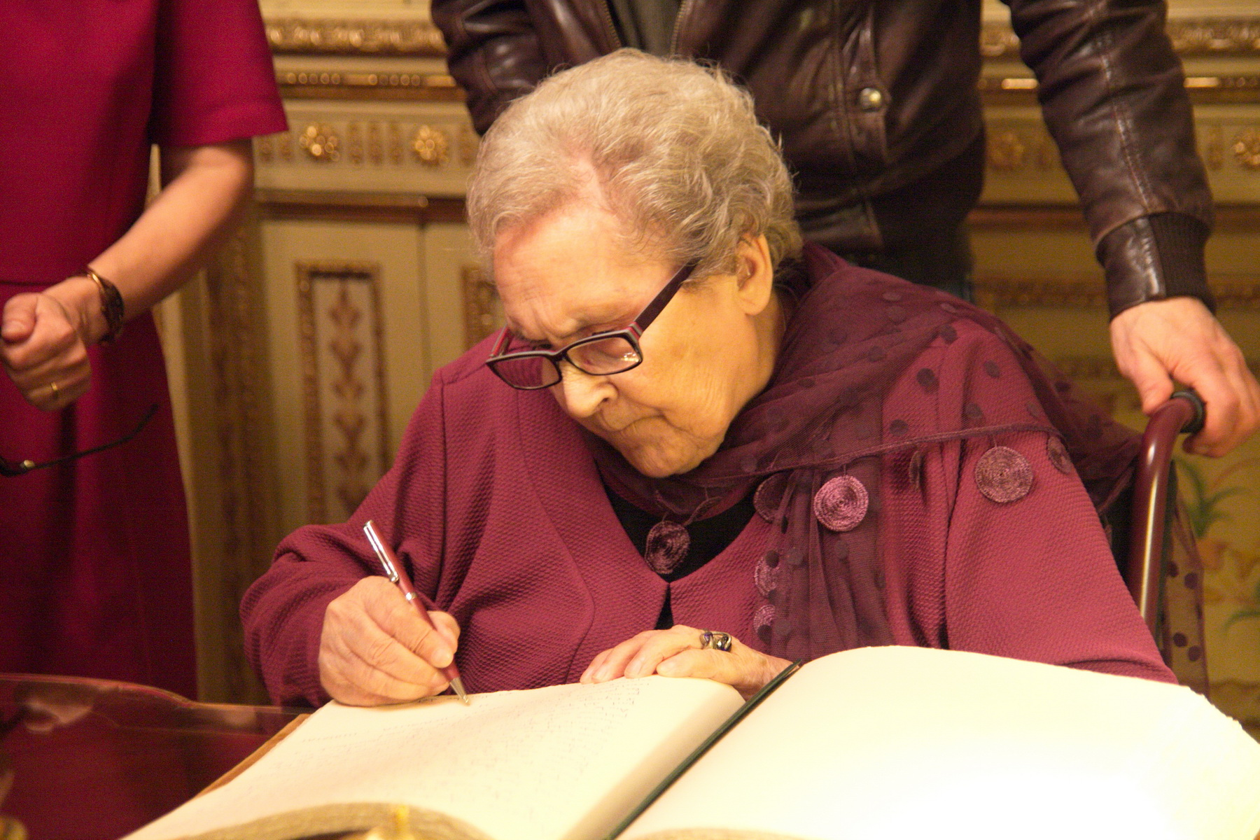 Acte de lliurament a Neus Català de la medalla d'Or al Mèrit Cívic de l'Ajuntament de Barcelona. 29-10-2014